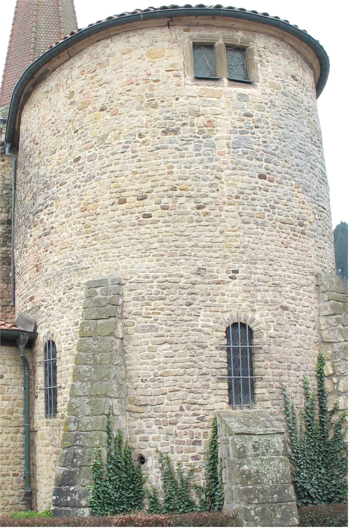 En Deel vun der Sëller Kierch. Kategorie:Gemeng Sëll